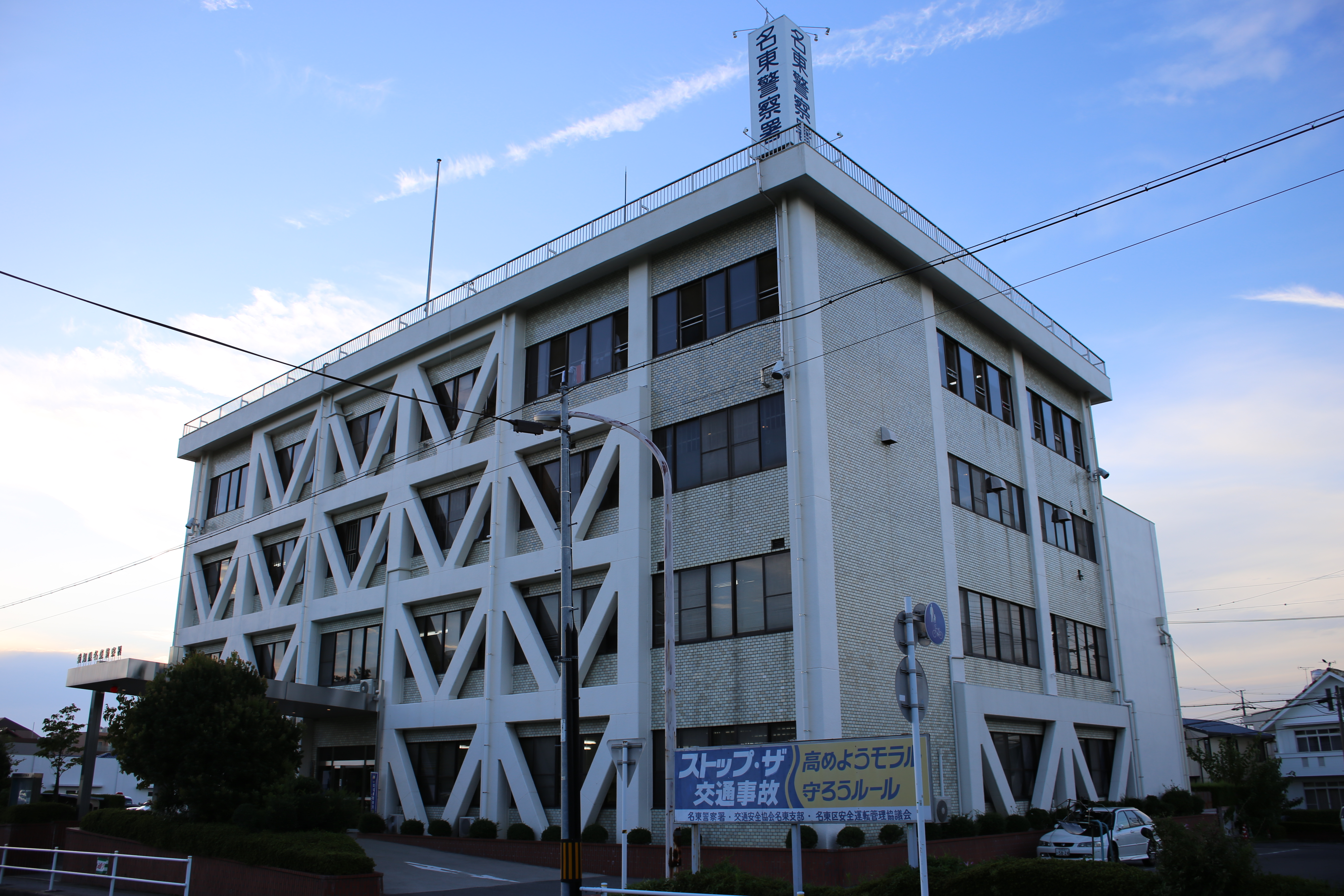 名古屋市名東区猪高台の愛知県警察名東警察署を南側公道東側より撮影